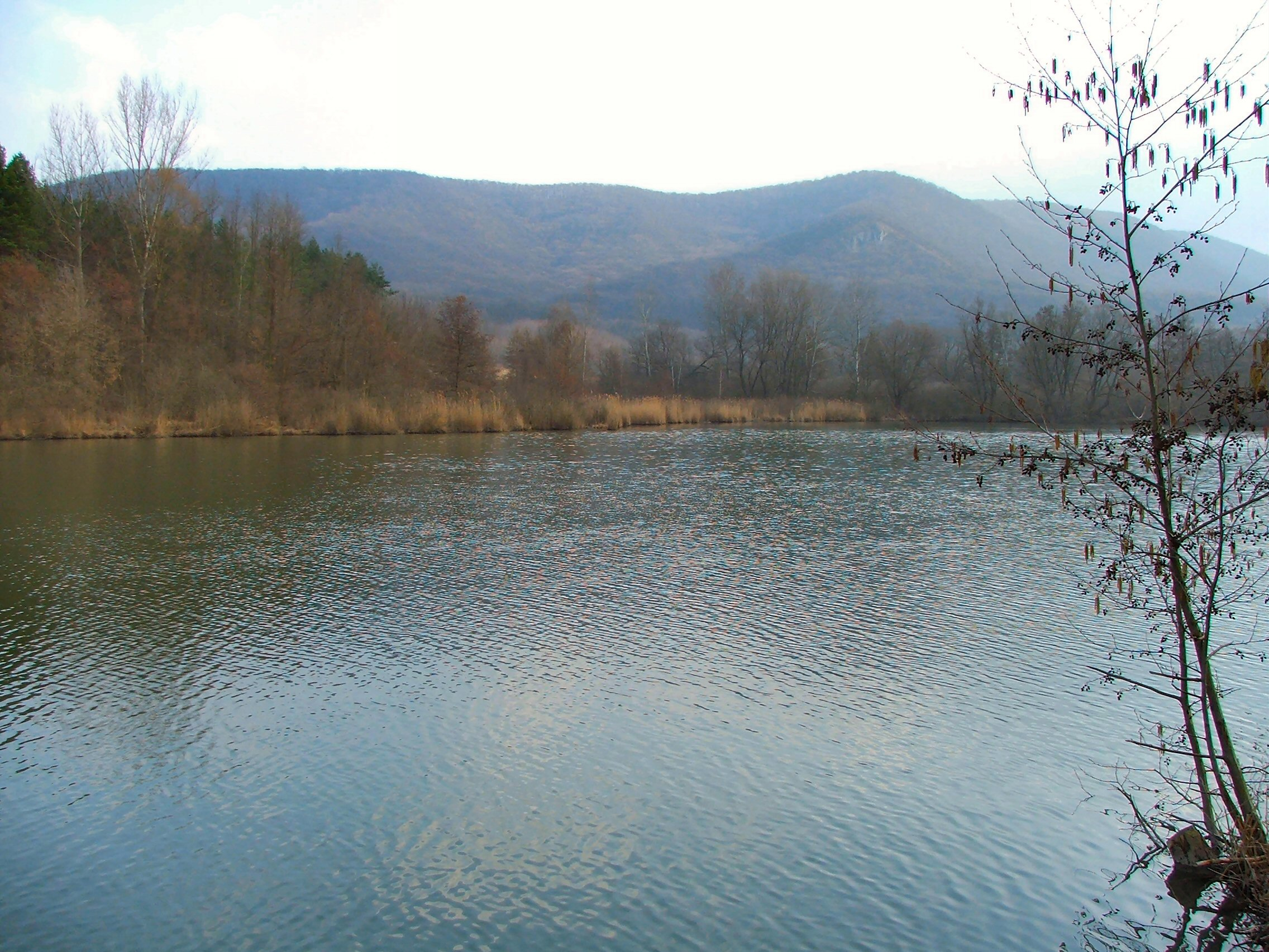 Az esztergomi Kerek-tó. The Round lake in Esztergom, Hungary.